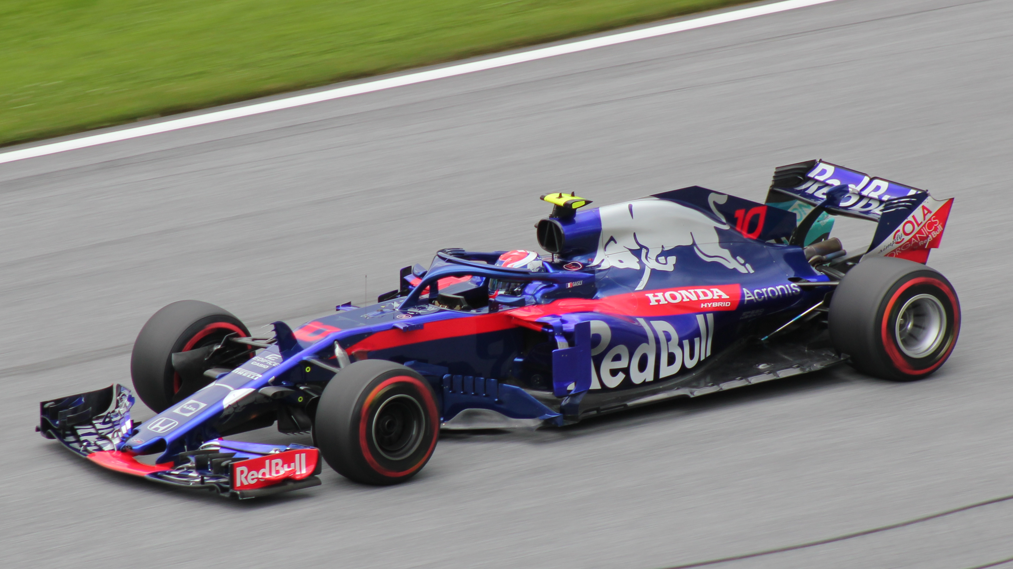 10 Gasly beim Rennwochenende in Österreich 2018